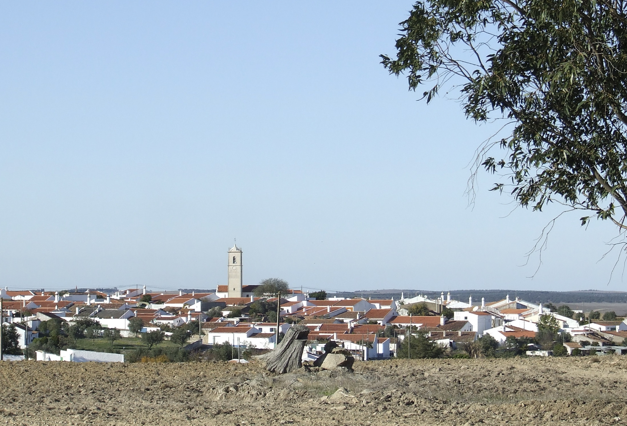 Casével